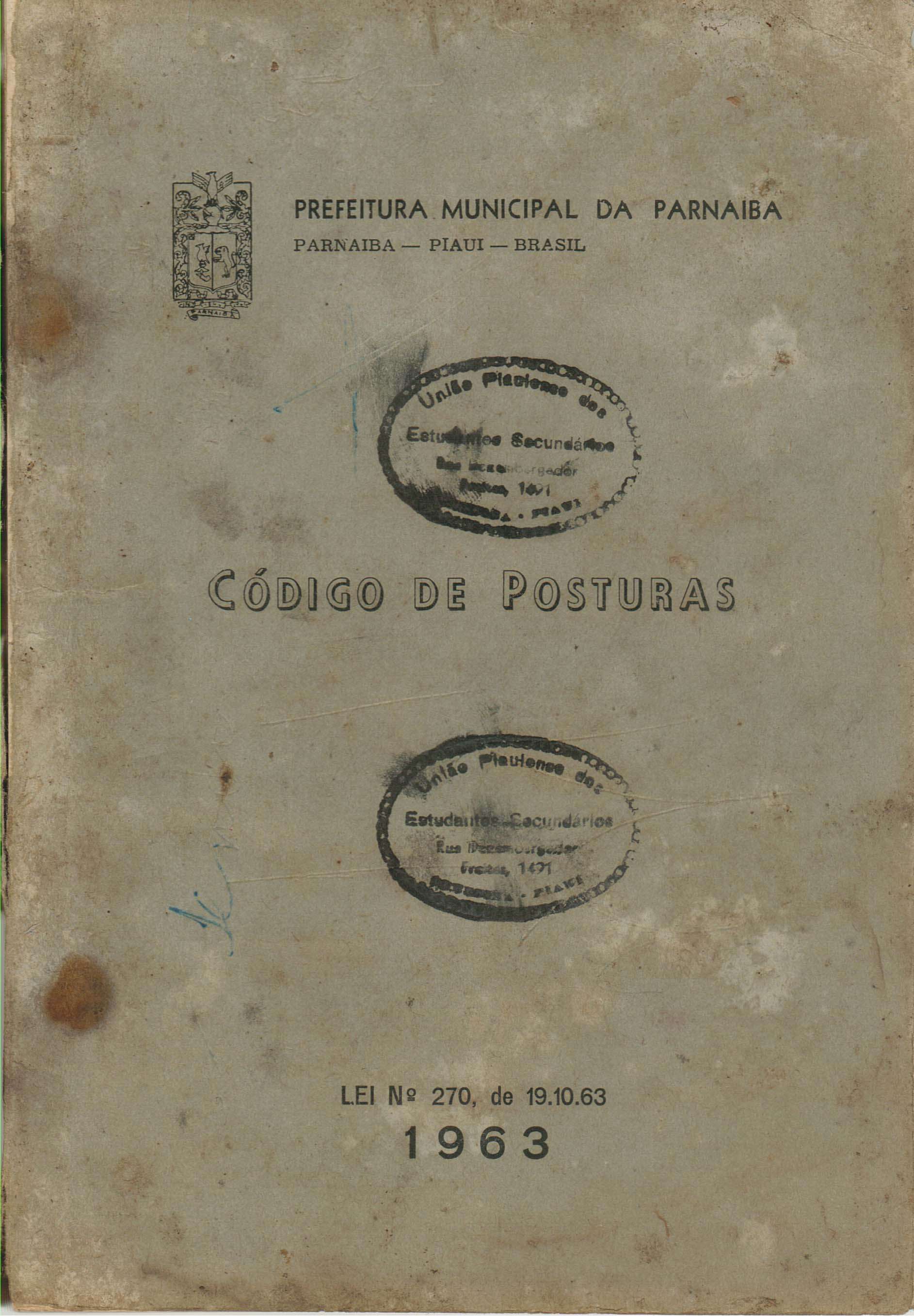 Lei municipal nº 270, de 19 de outubro de 1963 (Código de Posturas do Município de Parnaíba, no Piauí.